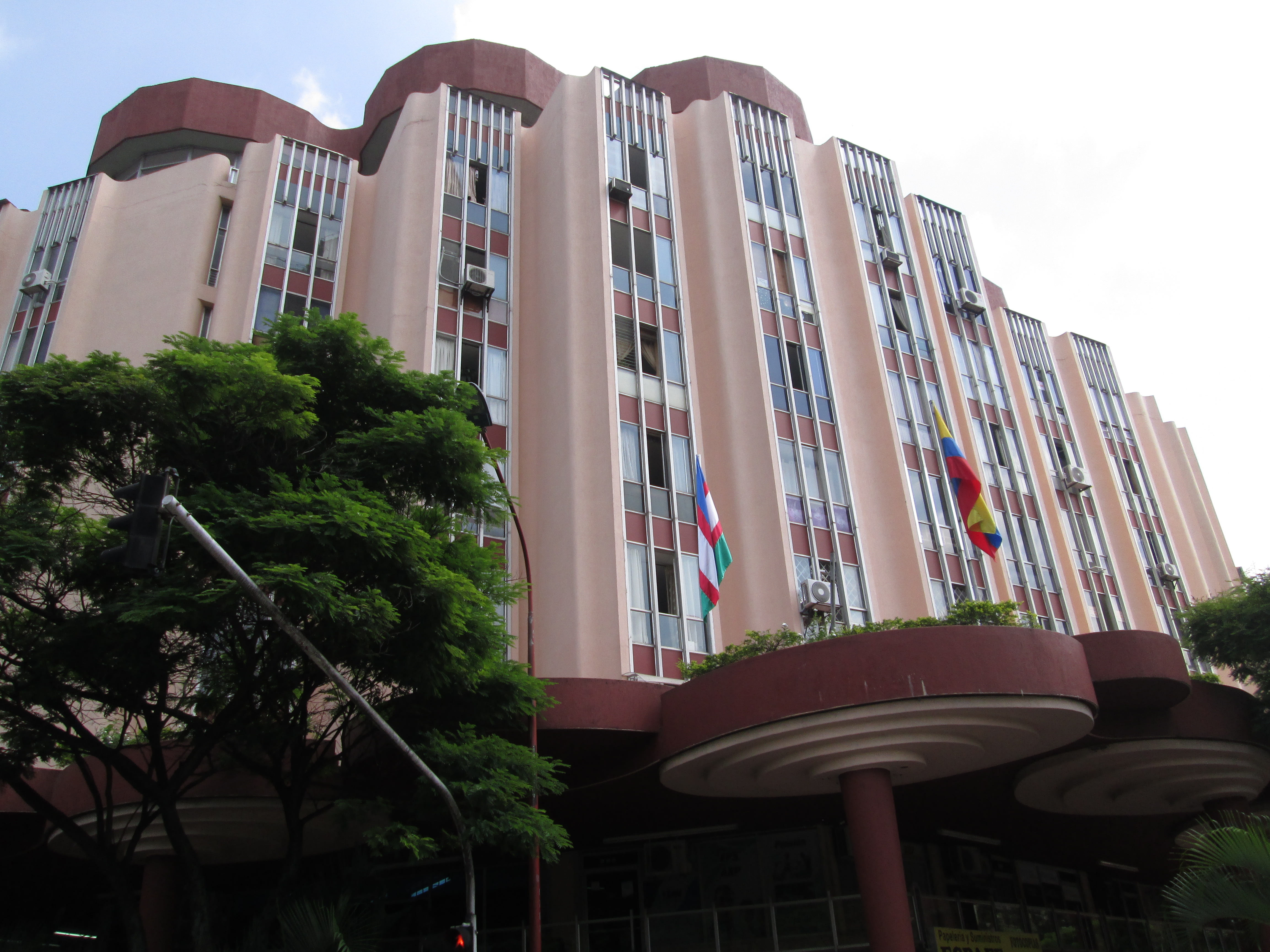 Cali.